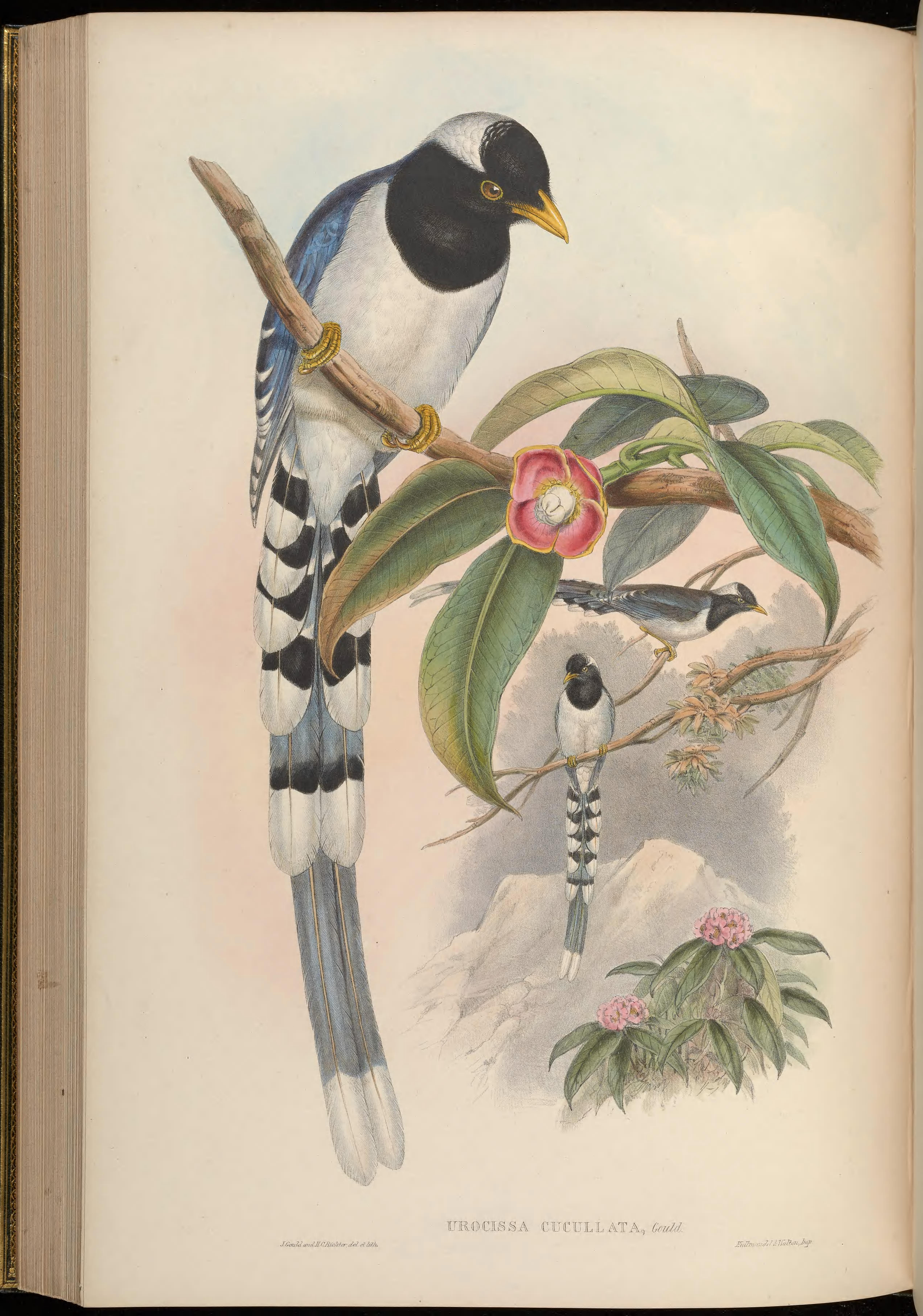 Urocissa cucullata = Urocissa flavirostris cucullata[1]